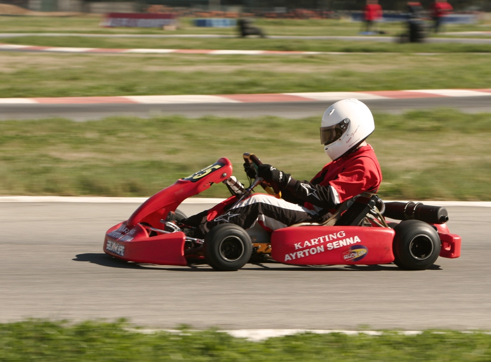 Aarón Filgueira, a bordo de un SeijoKart, en 2008